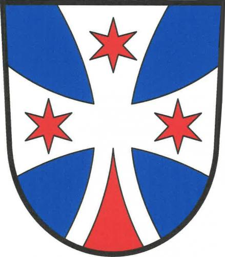 Popovičky znak